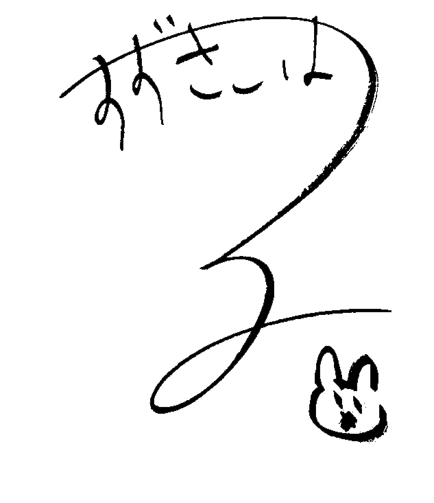 鈴木心春署名